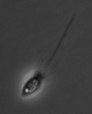 Live Monosiga 100x phase